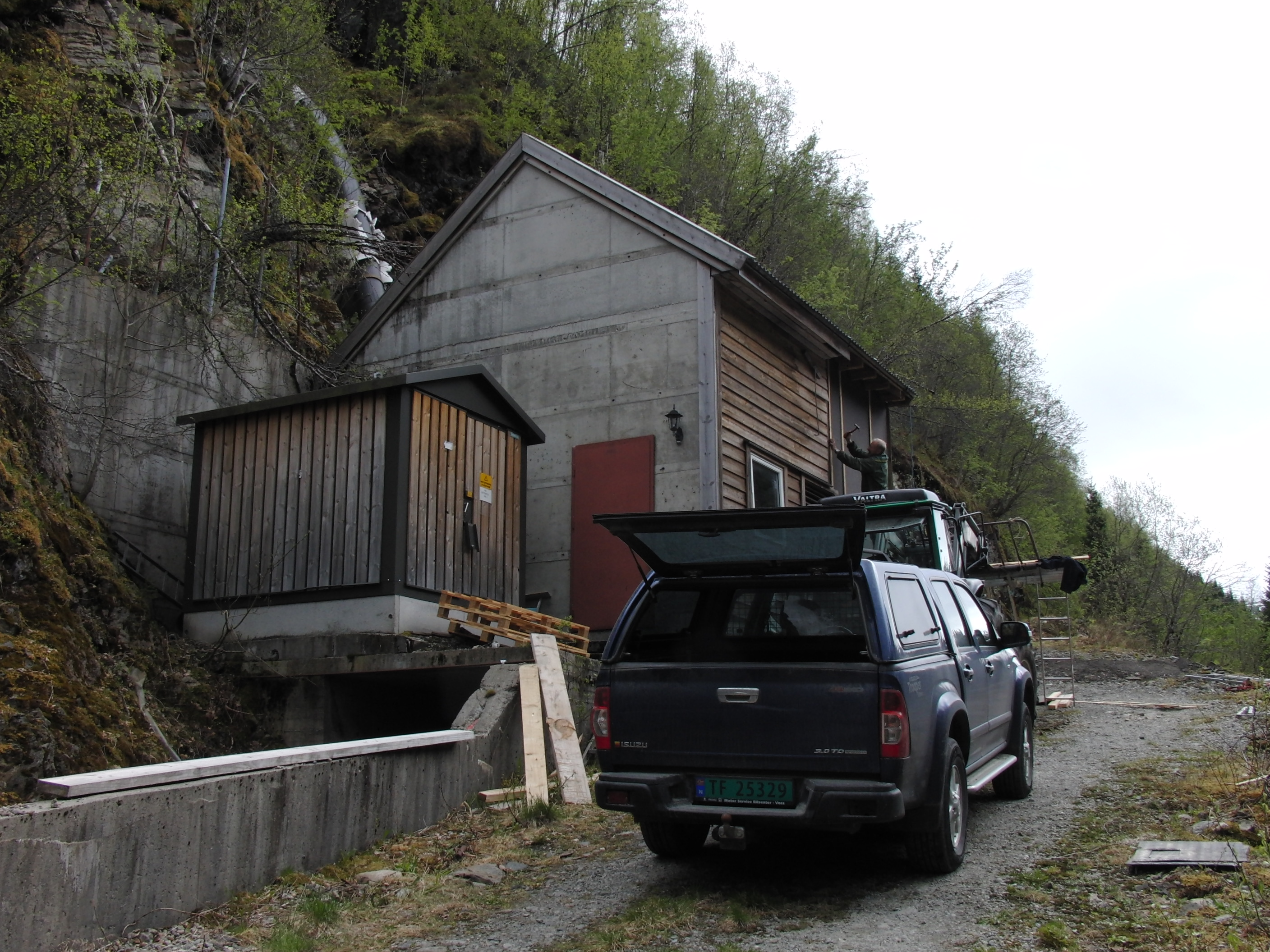 Botnaelva kraftverk